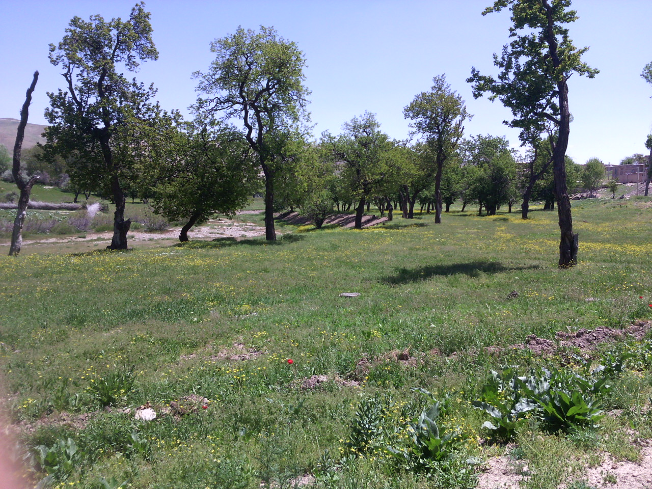 باغ قره دره